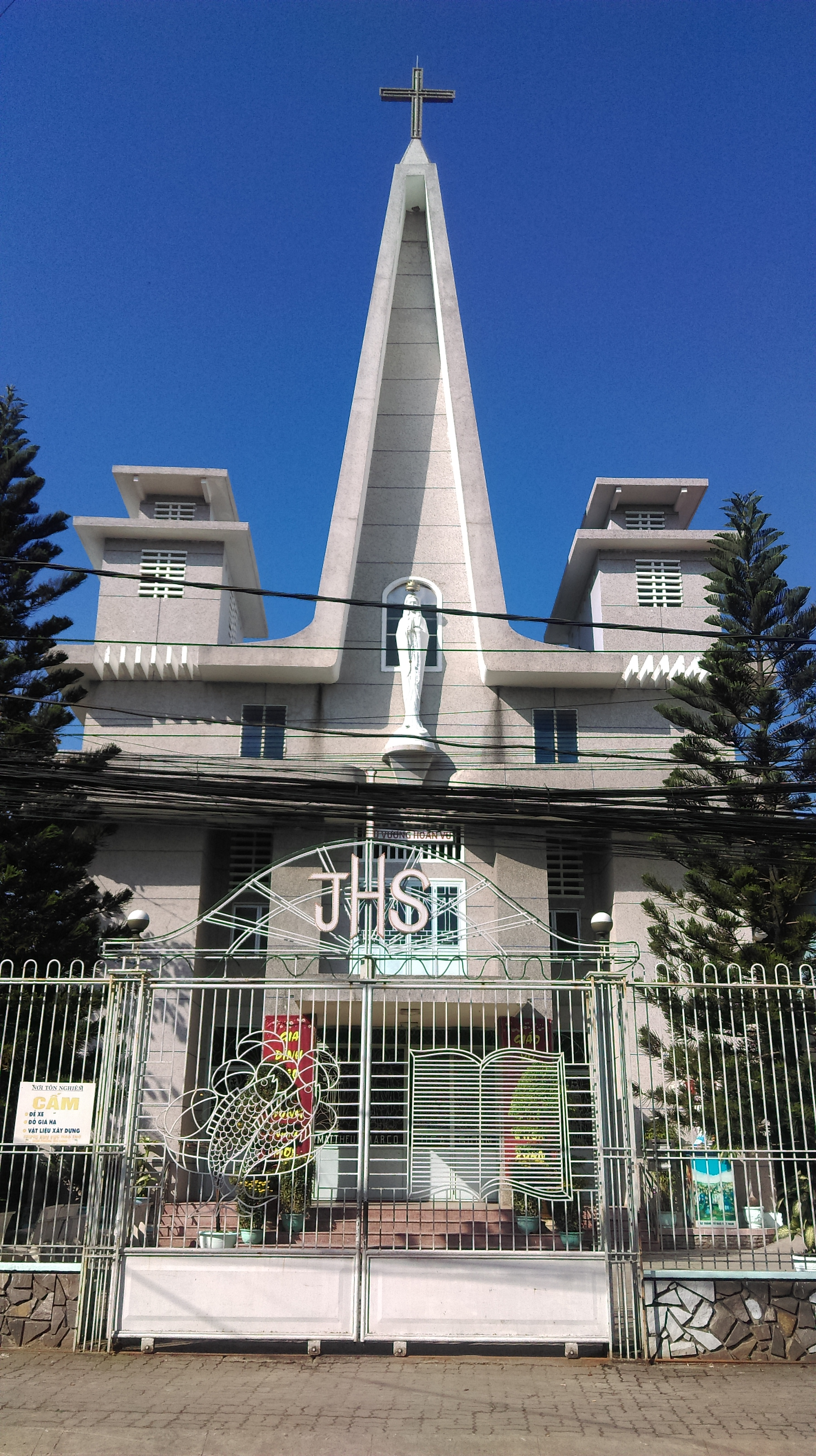 Nhà thờ Chính Trạch, Tân Chính, Thanh Khê, Đà Nẵng